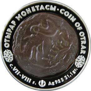 Памятная монета Республики Казахстан «Монета Отрара» из серии «Монеты старых чеканов» - Серебро - 500 тенге - реверс